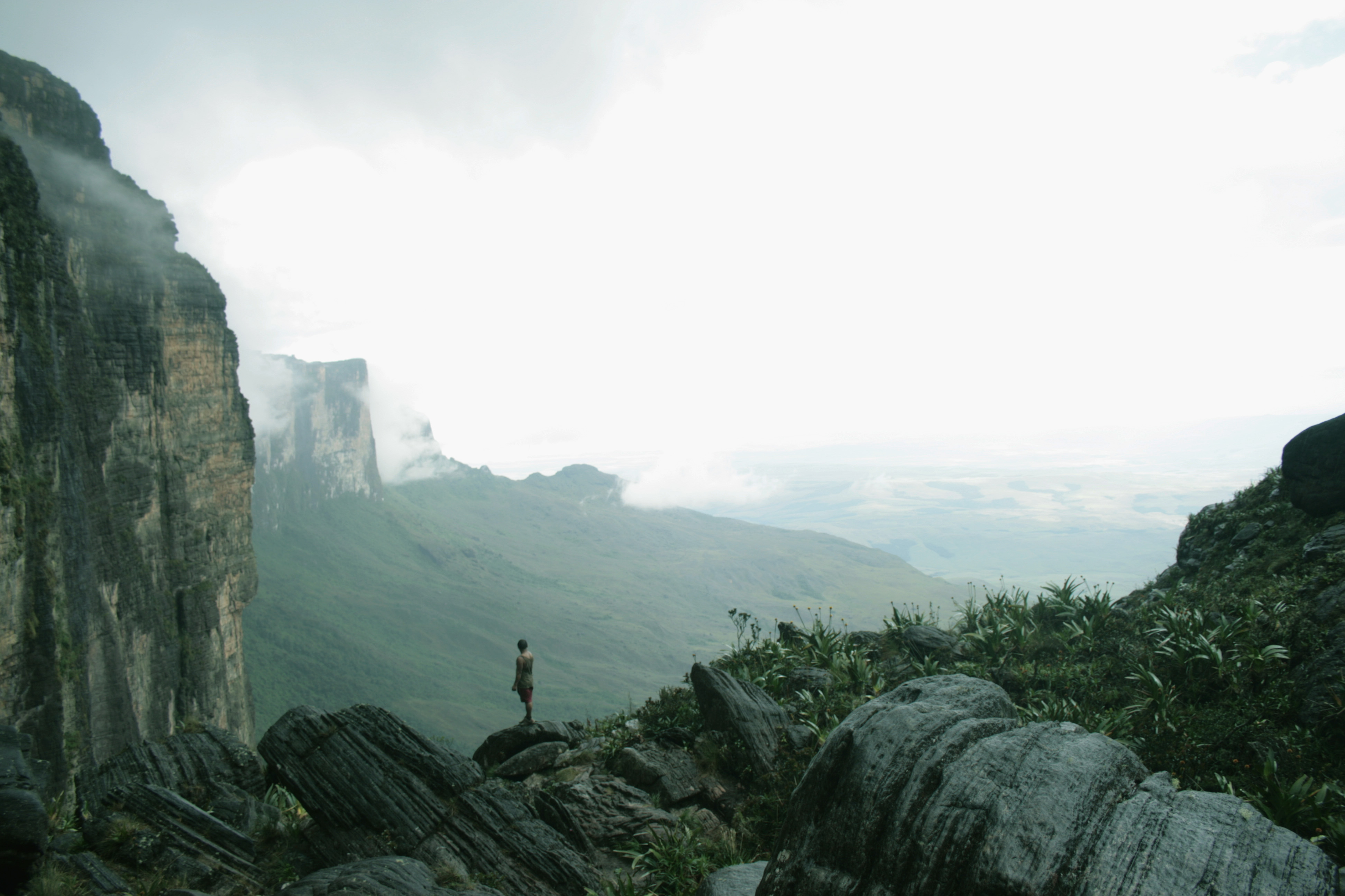 Monte Roraima. Tepui. Parque Nacional Canaima, estado Bolívar. Venezuela